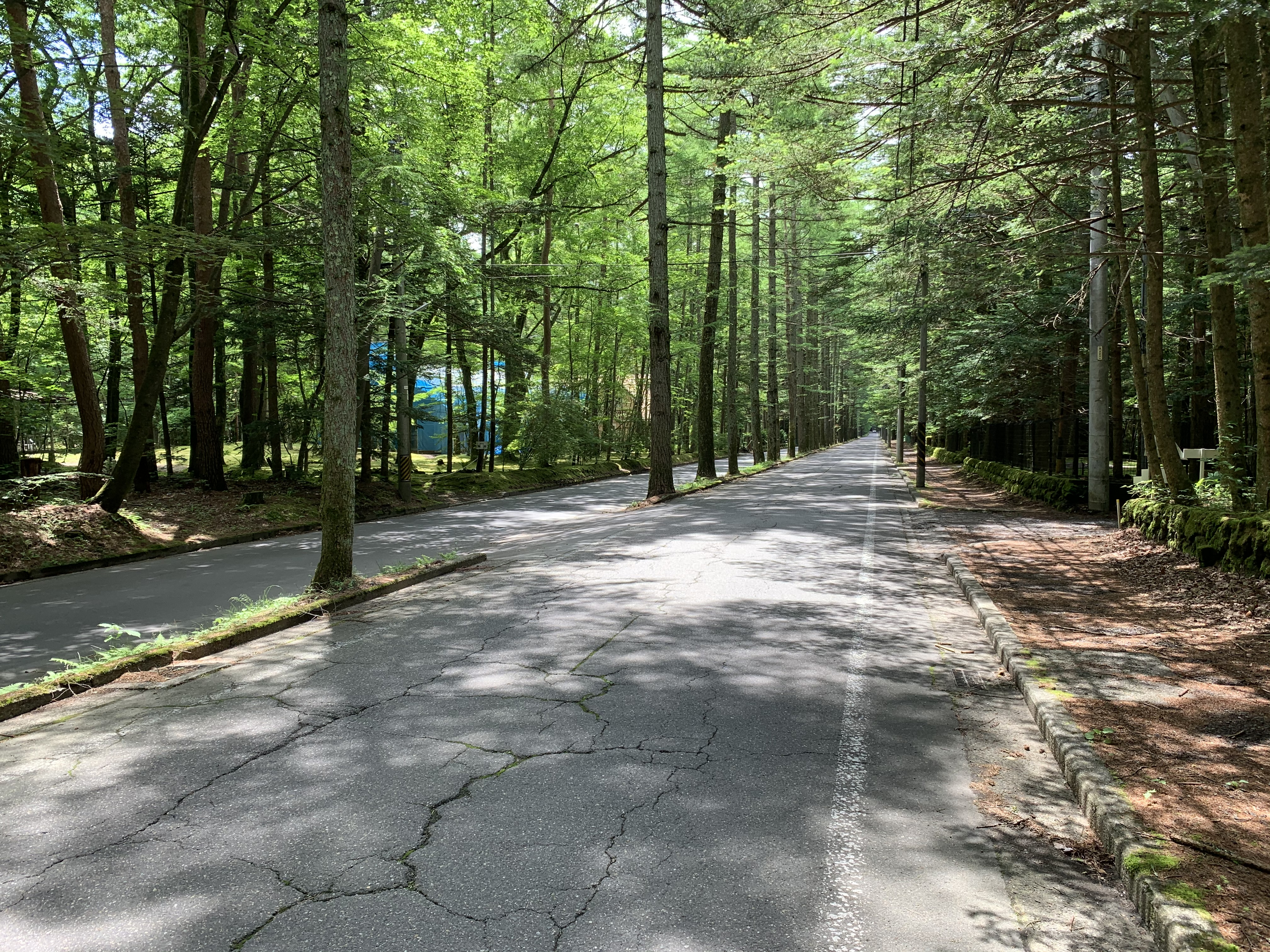 軽井沢, 夏, 三笠通り, 並木道